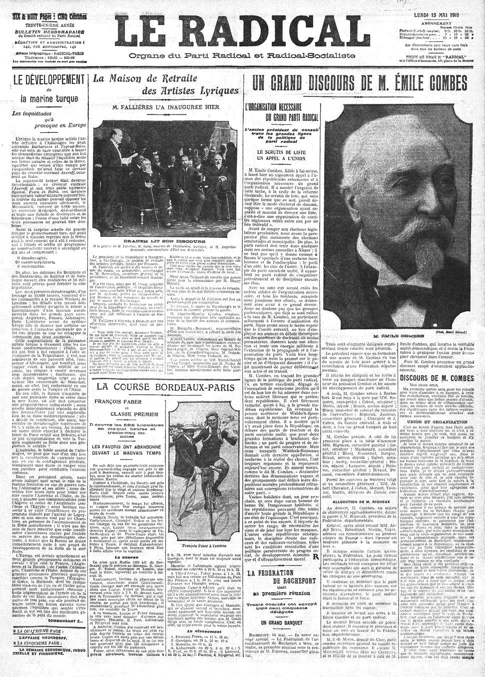 Une du Radical du 15 mai 1911.